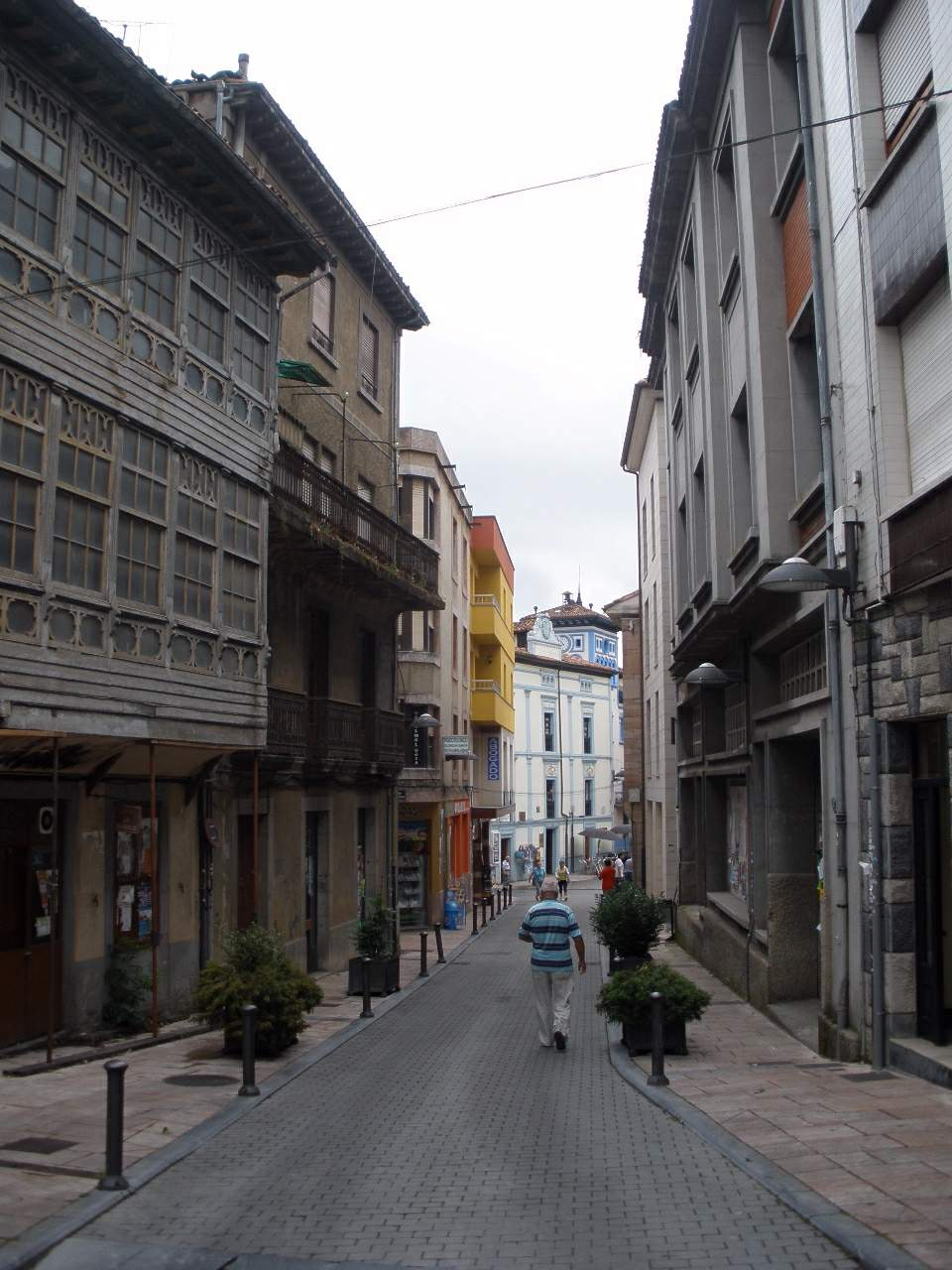 Grado (Asturias)